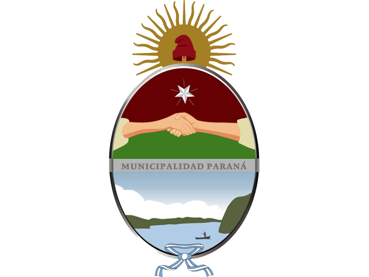 Nuevo Escudo de Paraná